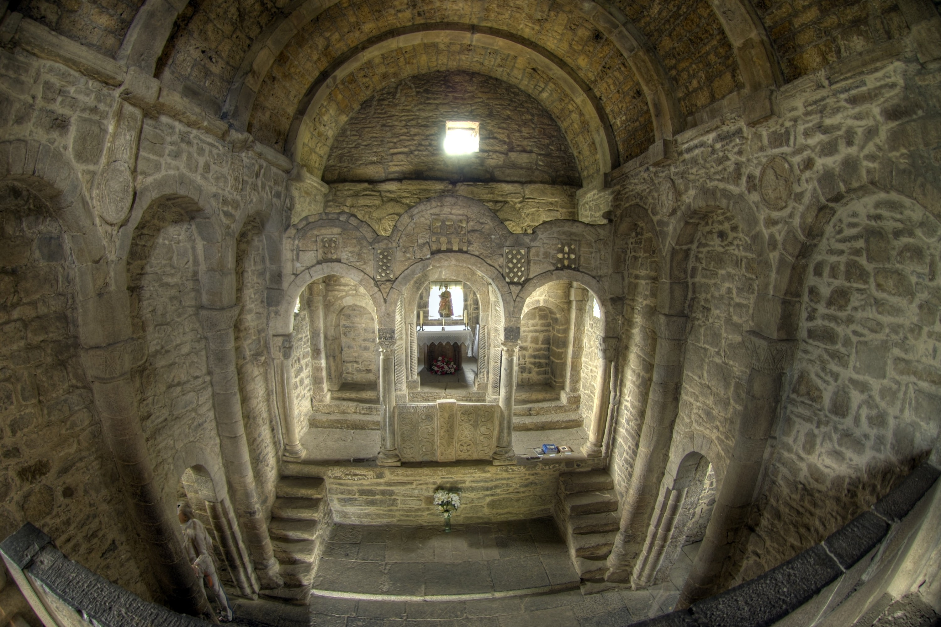 Interior de la iglesia en una vista superior tomada desde el coro